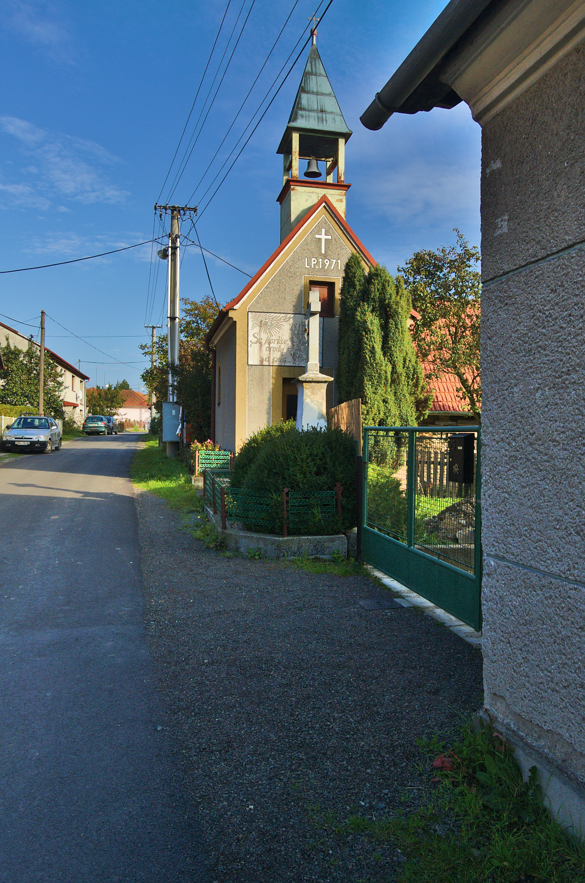 Kaple, Slavíkov, Budětsko, okres Prostějov